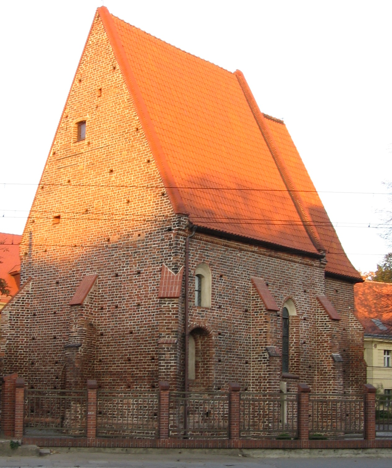 Wrocław, Poland St.Lazarus church